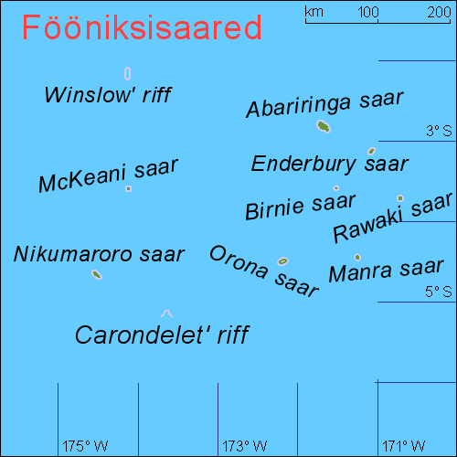 Fööniksisaarte kaart